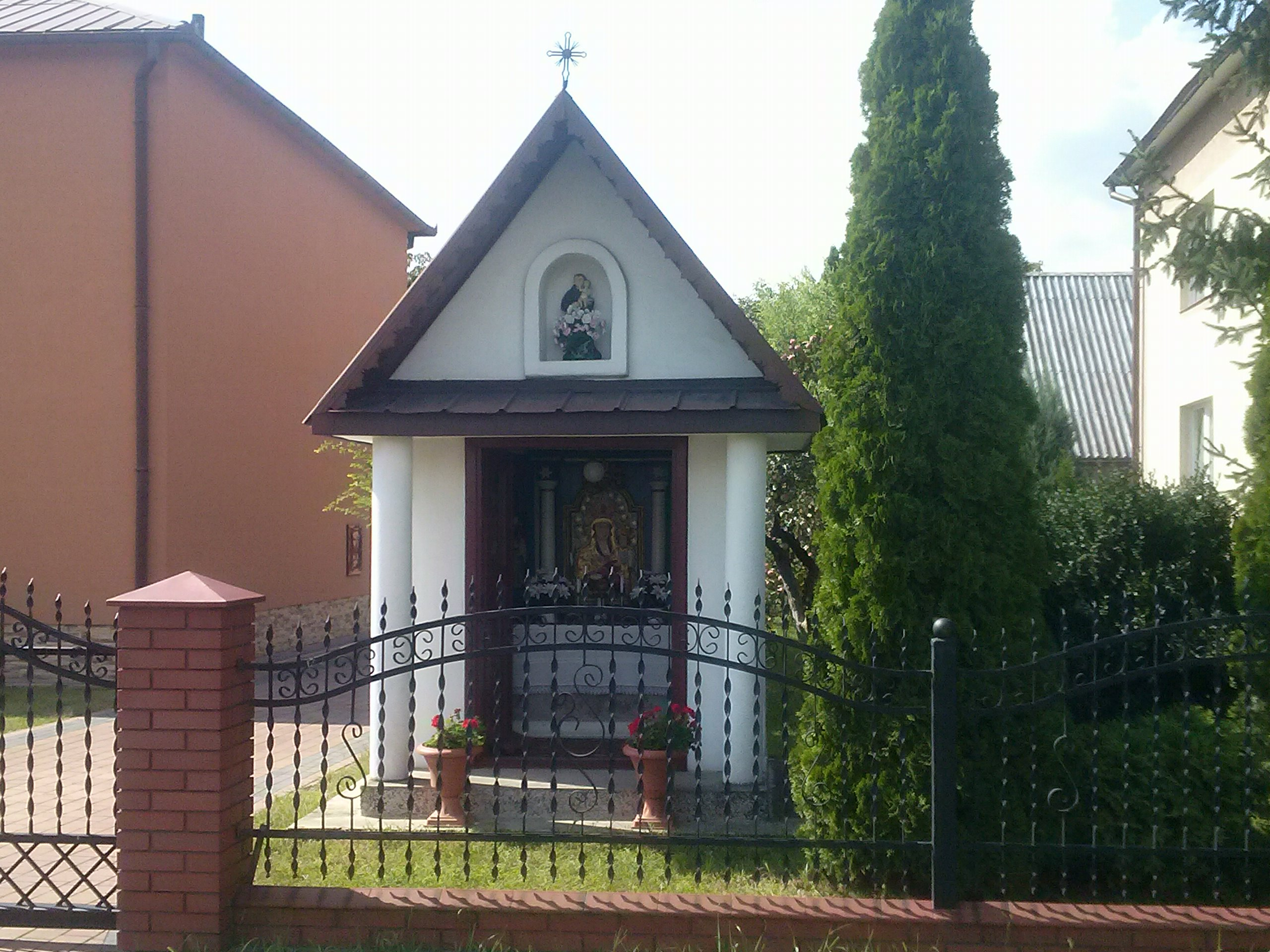 Kapliczka Matki Bożej w Gniewczynie Łańcuckiej